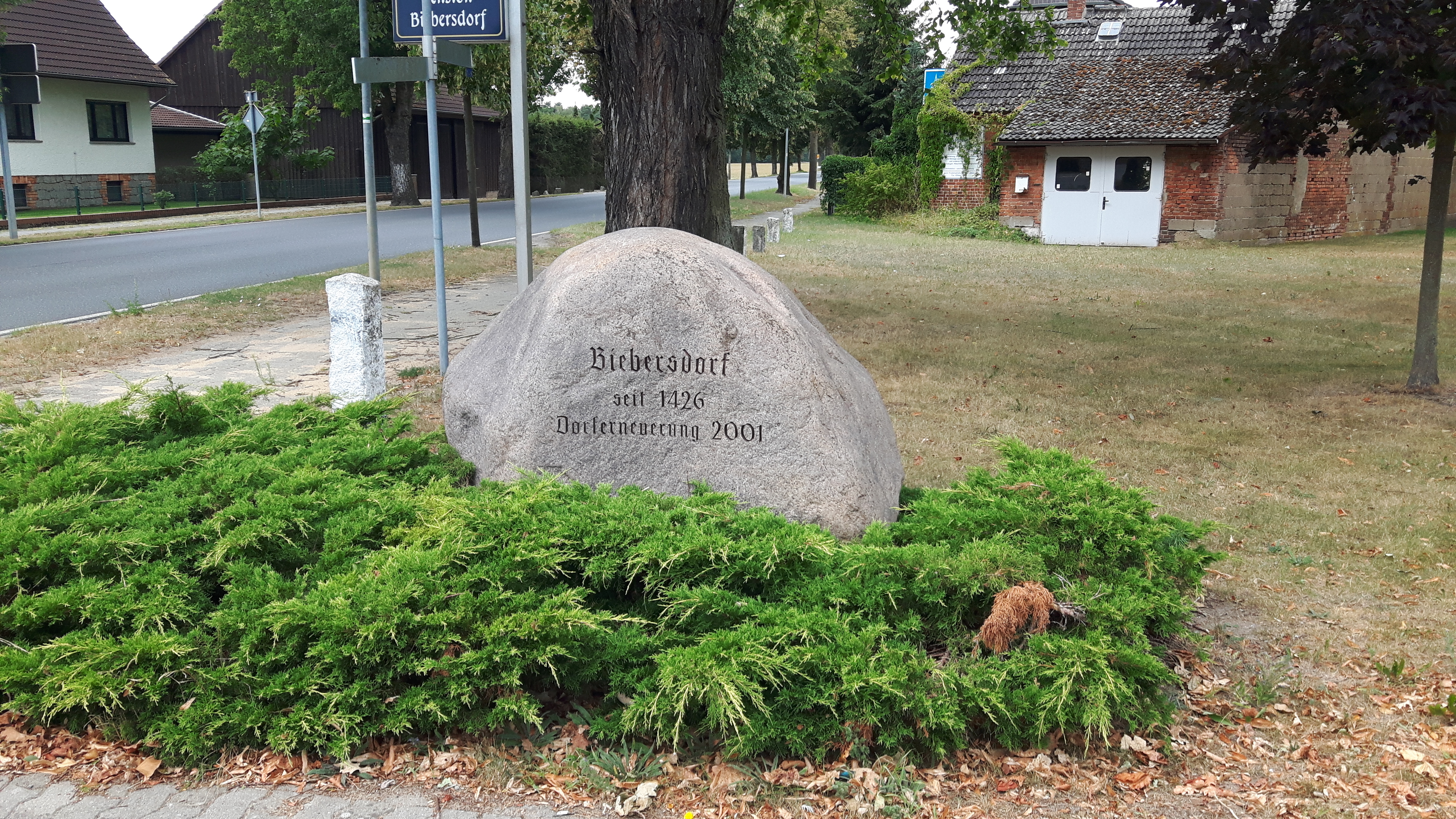 Stein mit der Aufschrift der Ersterwähnung Biebersdorfs im Dorfzentrum.